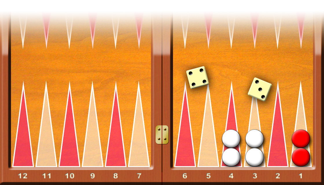 Backgammon--Dadi_4e3-Mossa obbligata nel togliere le pedine Francesco De Lorenzo (fr.dl CHIOCCIOLA tiscali.it) è l'autore di questa immagine e l'ha rilasciata sotto licenza GFDL